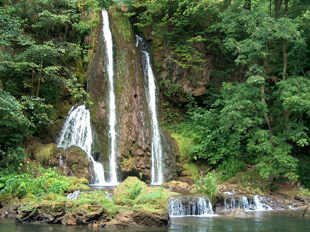 A révi (Románia, Bihar megye) vízesés